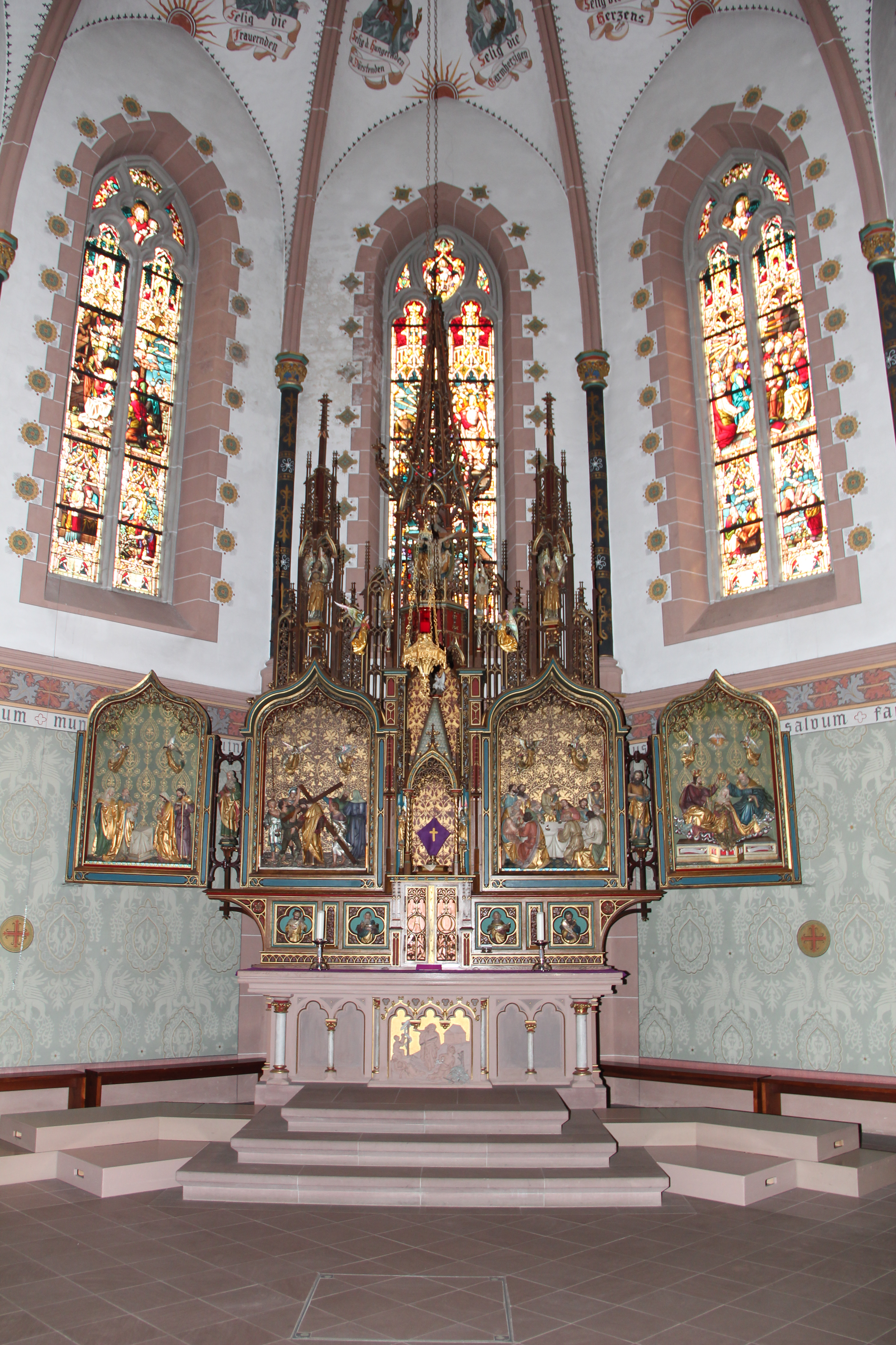 Hochaltar in der St. Martinkirche in Schweich